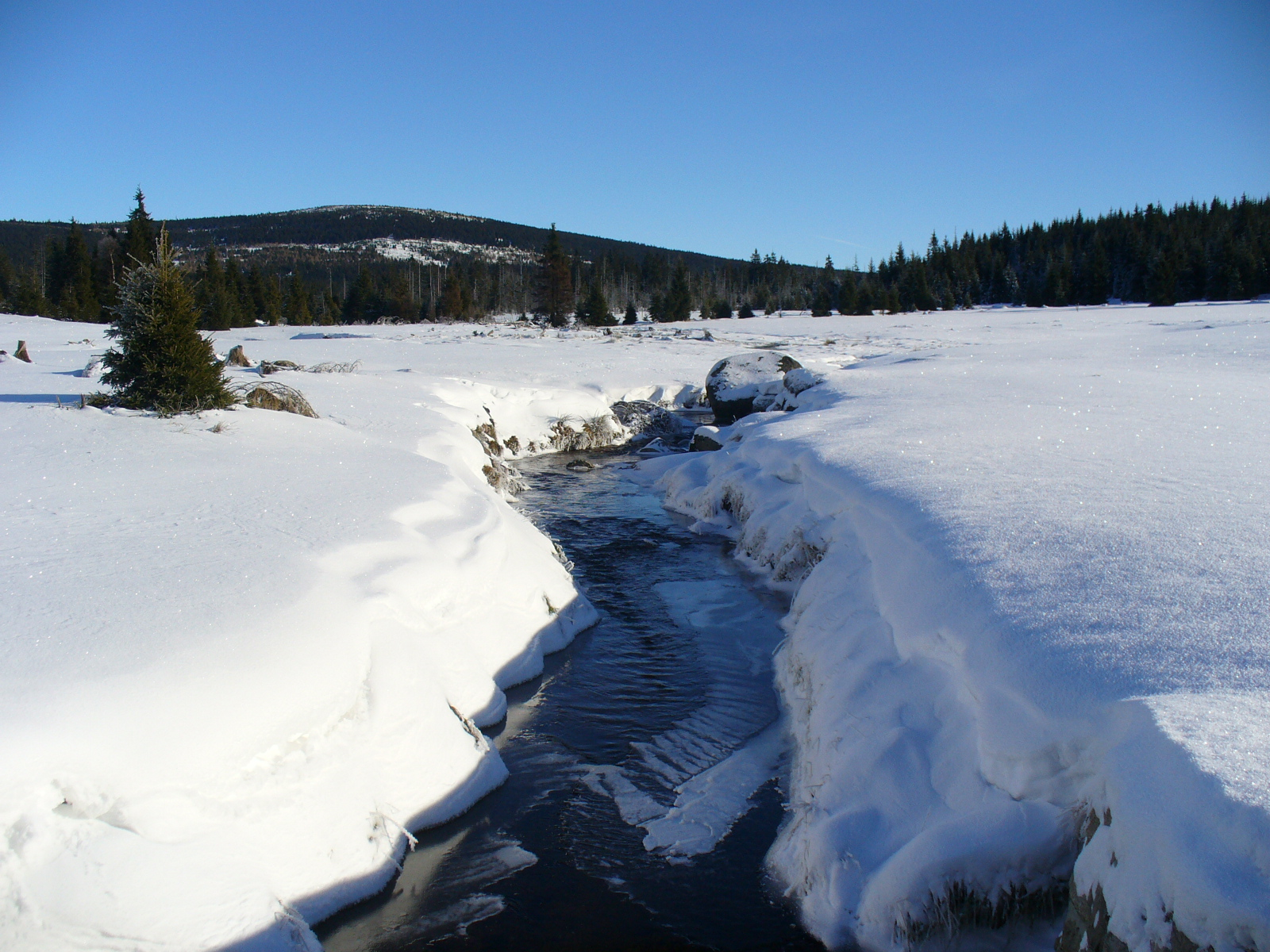 Großen Iserwiese - glade in Jizera Mountains